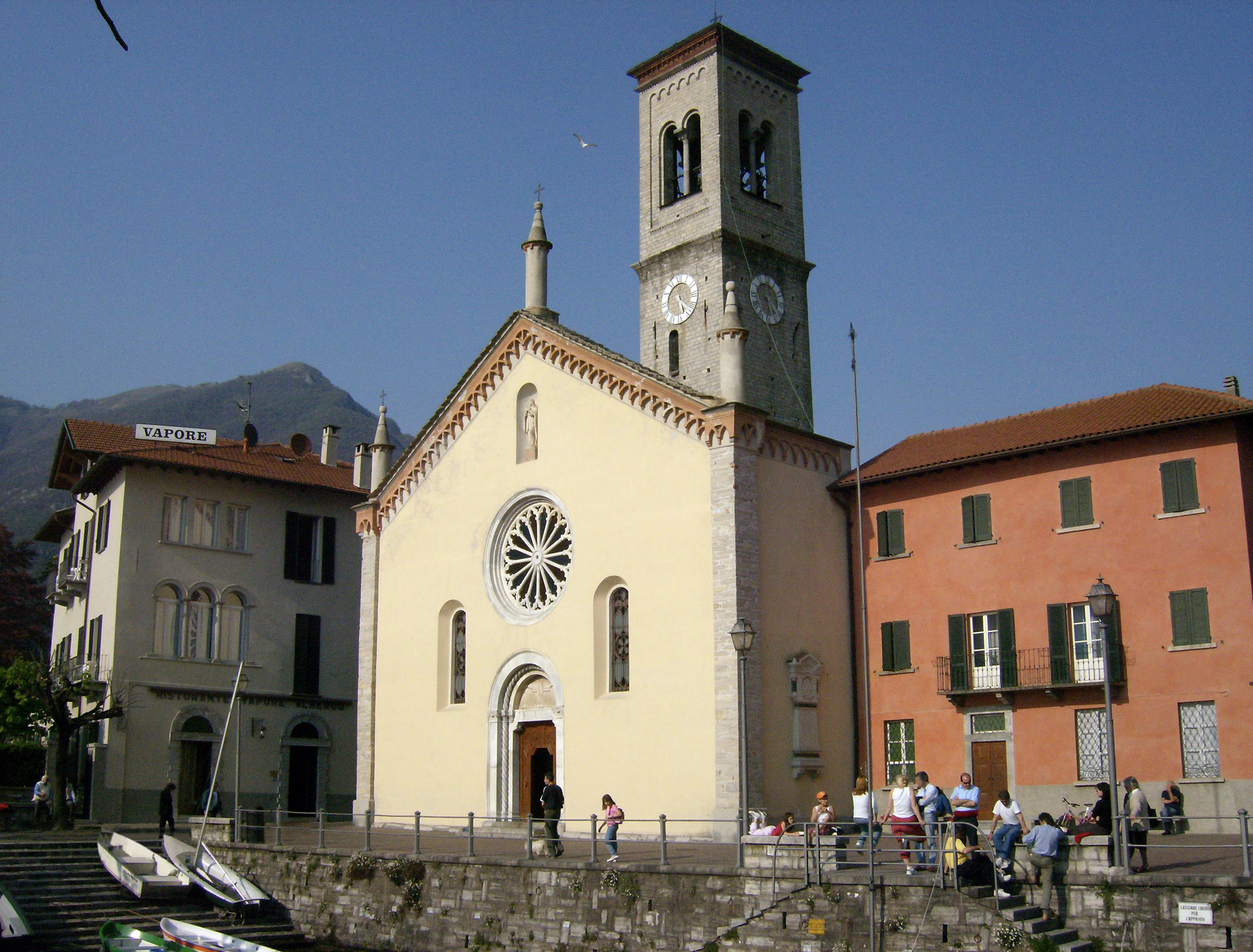 Chiesa di Santa Tecla